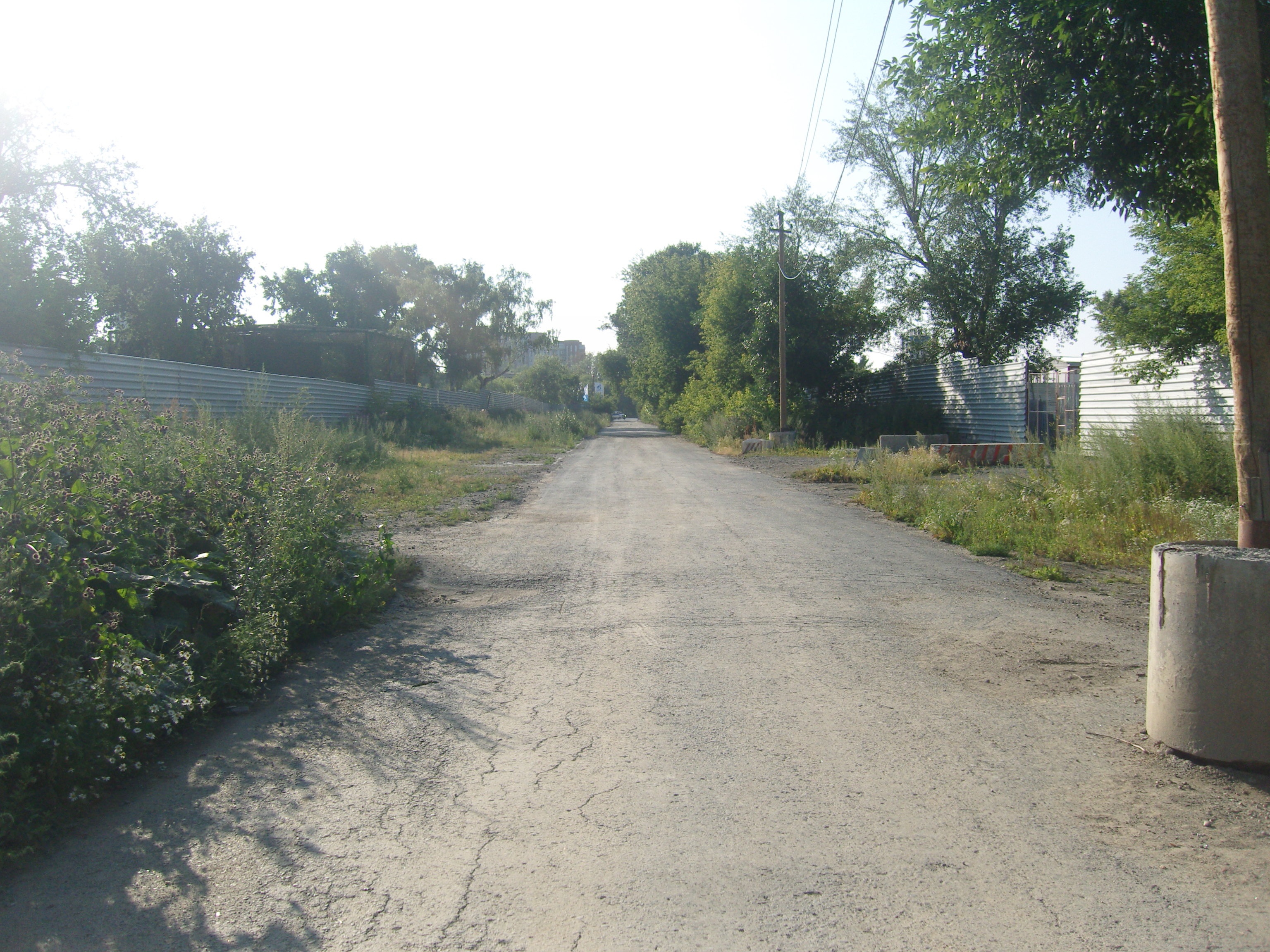 Улица Февральской Революции, конечная (снесённая) часть.